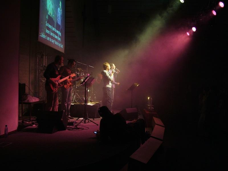 Een foto gemaakt tijdens een avond van jeugdkerk D-Vote. Zelfgemaakte foto vrijgegeven onder GFDL.